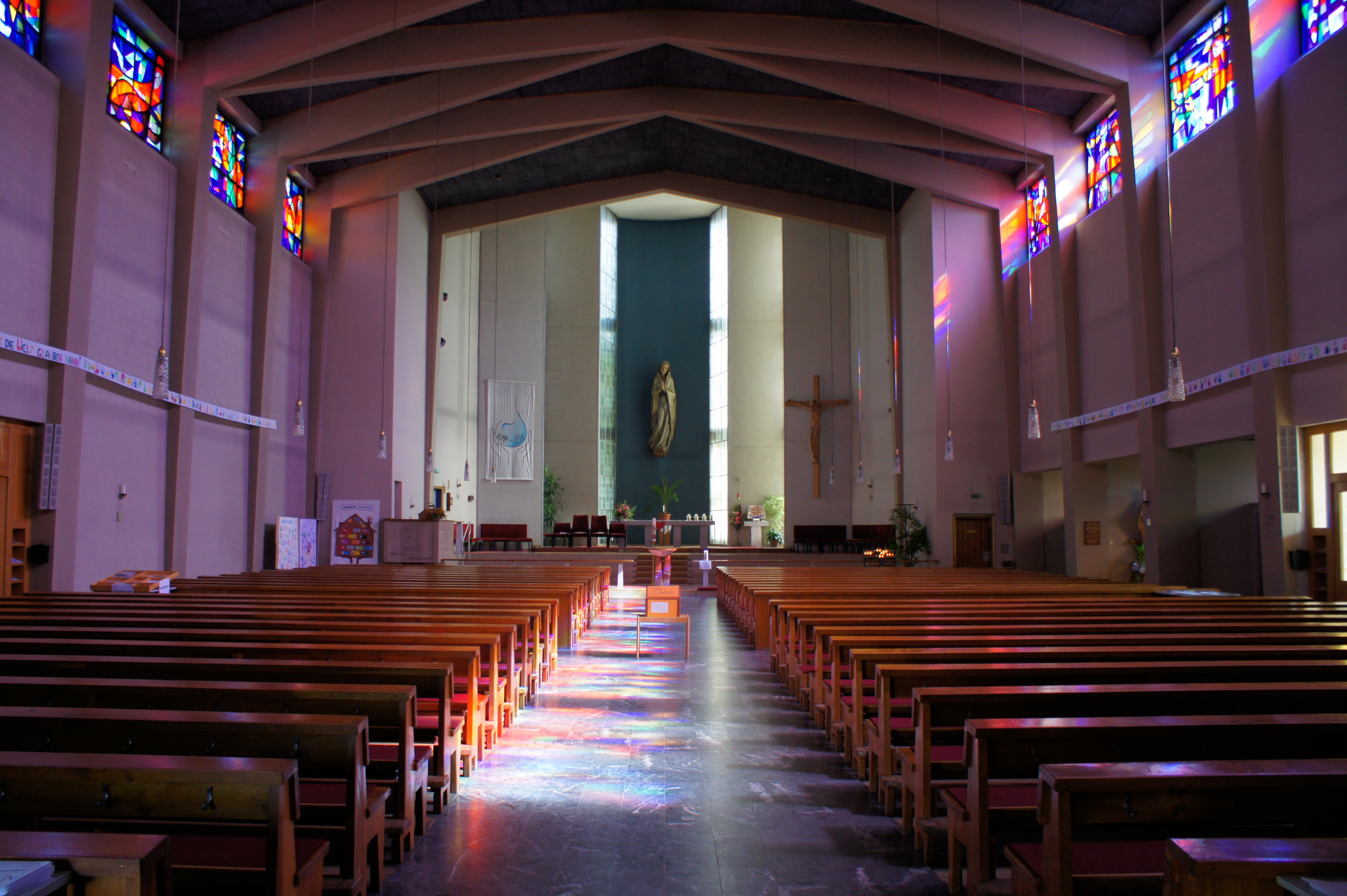 Kath. Pfarrkirche Maria Lourdes